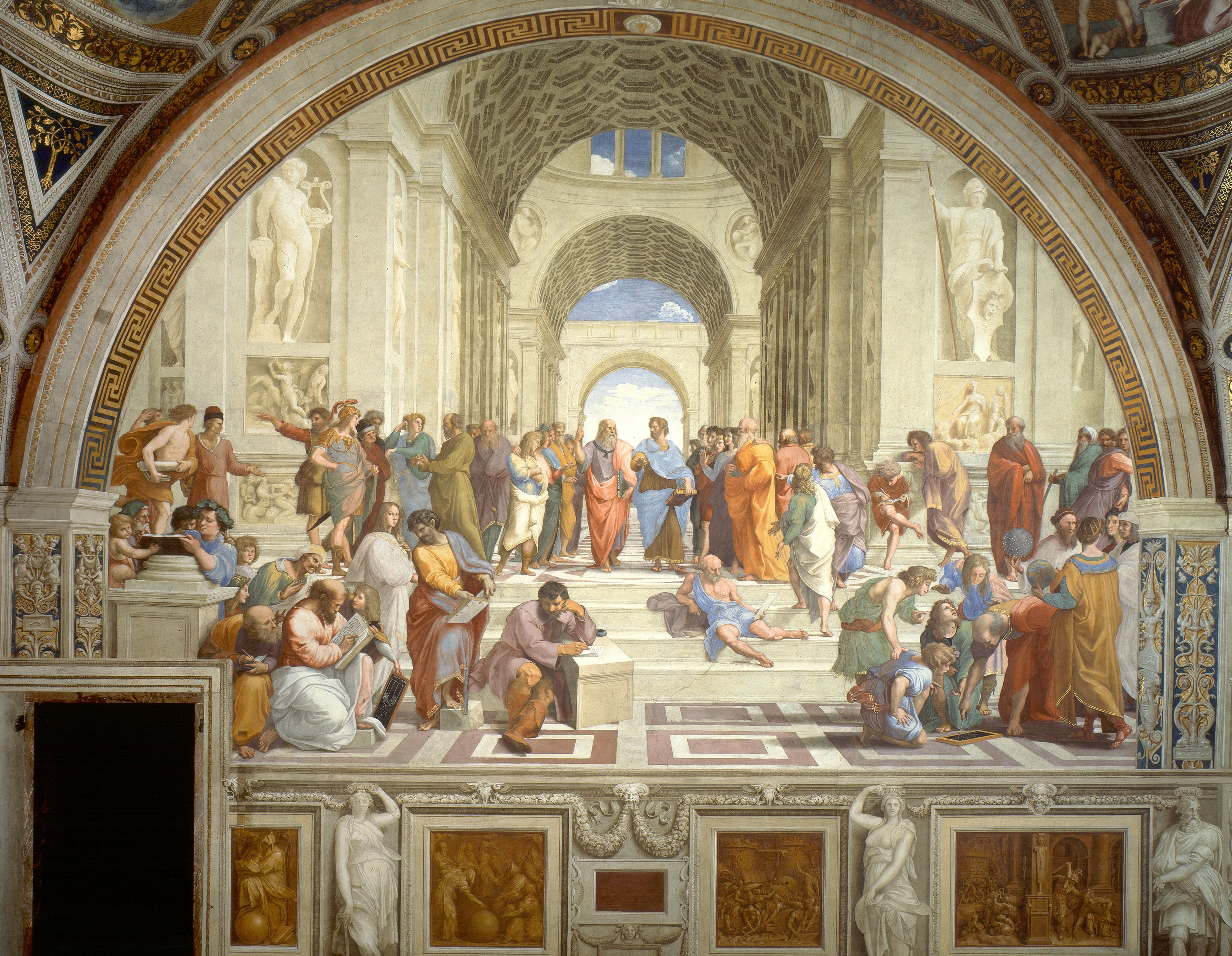 Scuola di AteneThe School of Athenstitle QS:P1476,it:"Scuola di Atene" label QS:Lit,"Scuola di Atene" label QS:Lfr,"L'École d'Athènes" label QS:Len,"The School of Athens" label QS:Lar,"مدرسة أثينا" label QS:Les,"La escuela de Atenas" label QS:Lel,"Η Σχολή των Αθηνών"